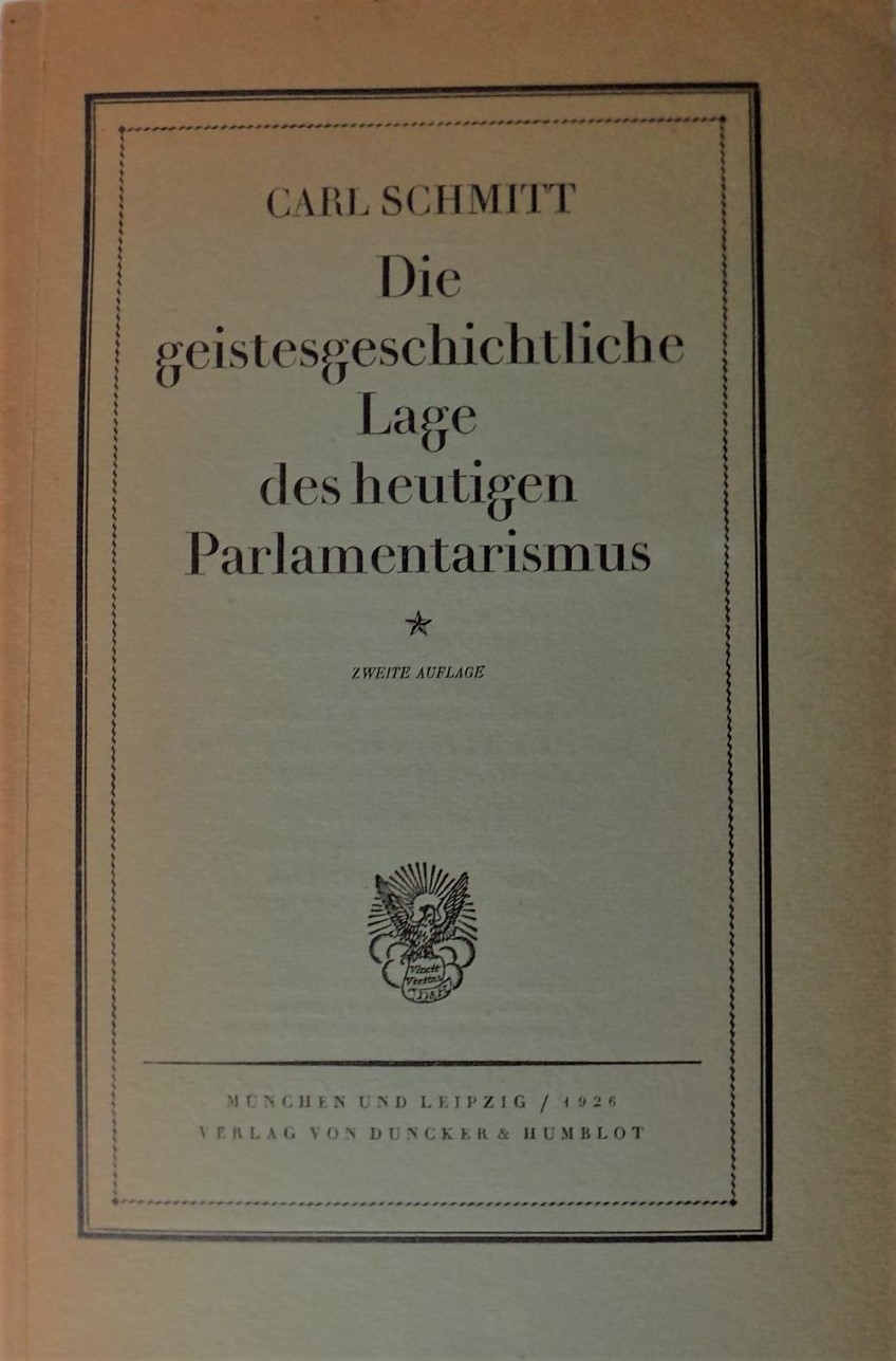 Carl Schmitt: Die geistesgeschichtliche Lage des heutigen Parlamentarismus. 2. Auflage (= Wissenschaftliche Abhandlungen und Reden zur Philosophie, Politik und Geistesgeschichte, Heft I), Verlag von Duncker und Humblot, München-Leipzig, 1926.